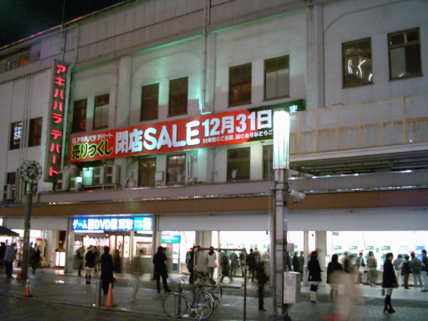 akihabara-Department store akihabara City Japan